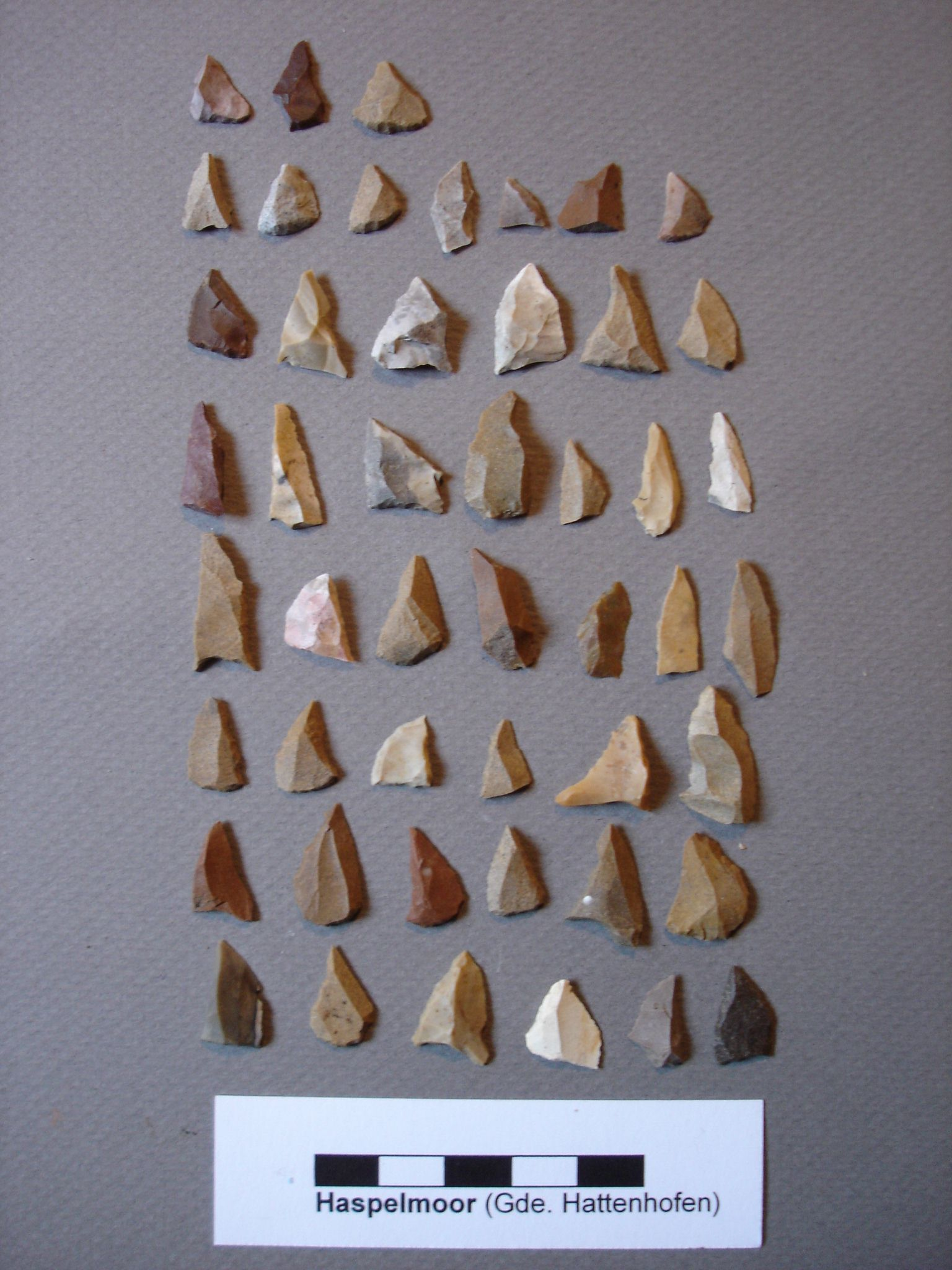 Haspelmoor, Mikrolithen aus dem Mesolithikum